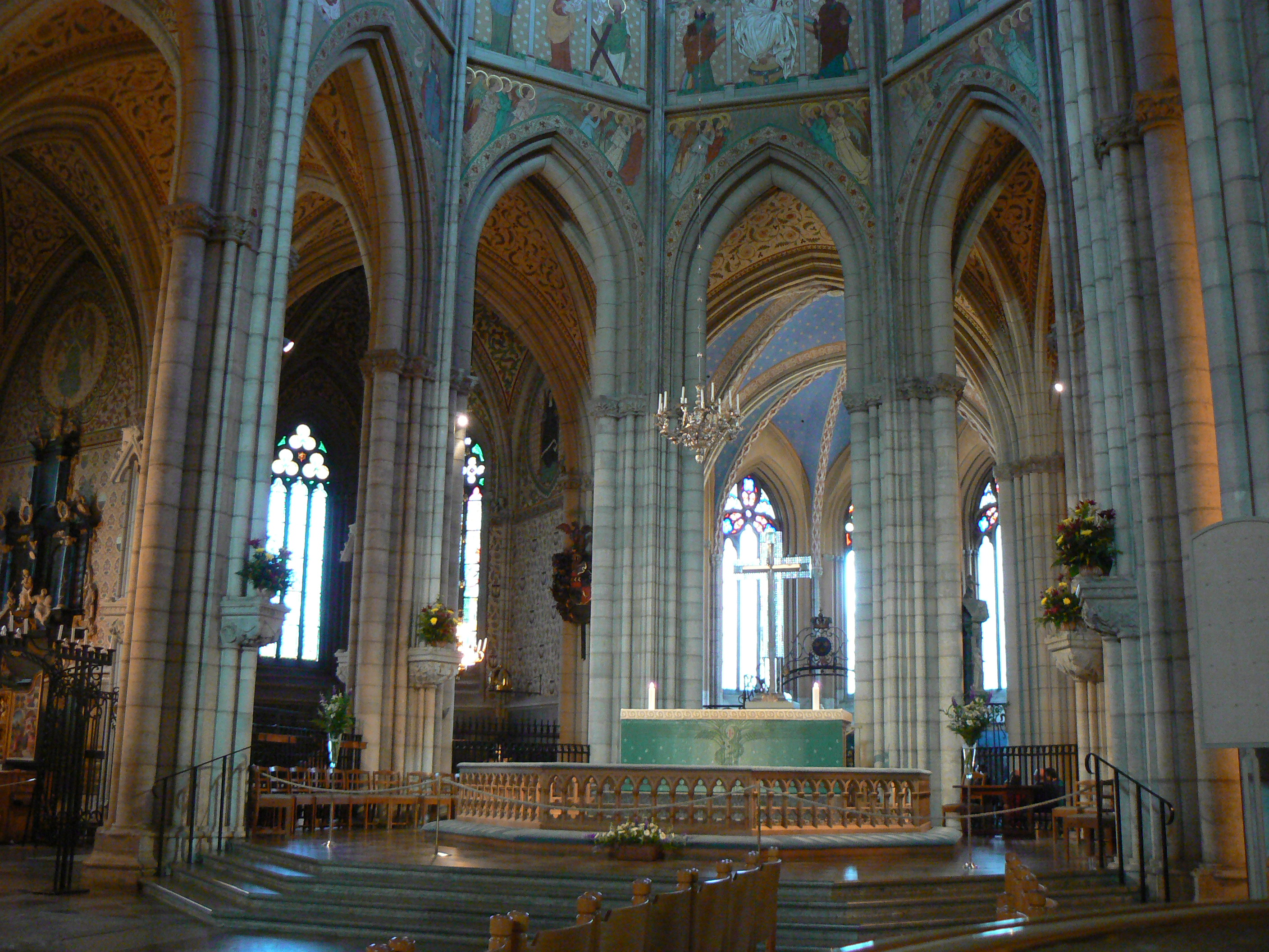 Prezbiterium katedry w Uppsali - narodowego sanktuarium Szwecji